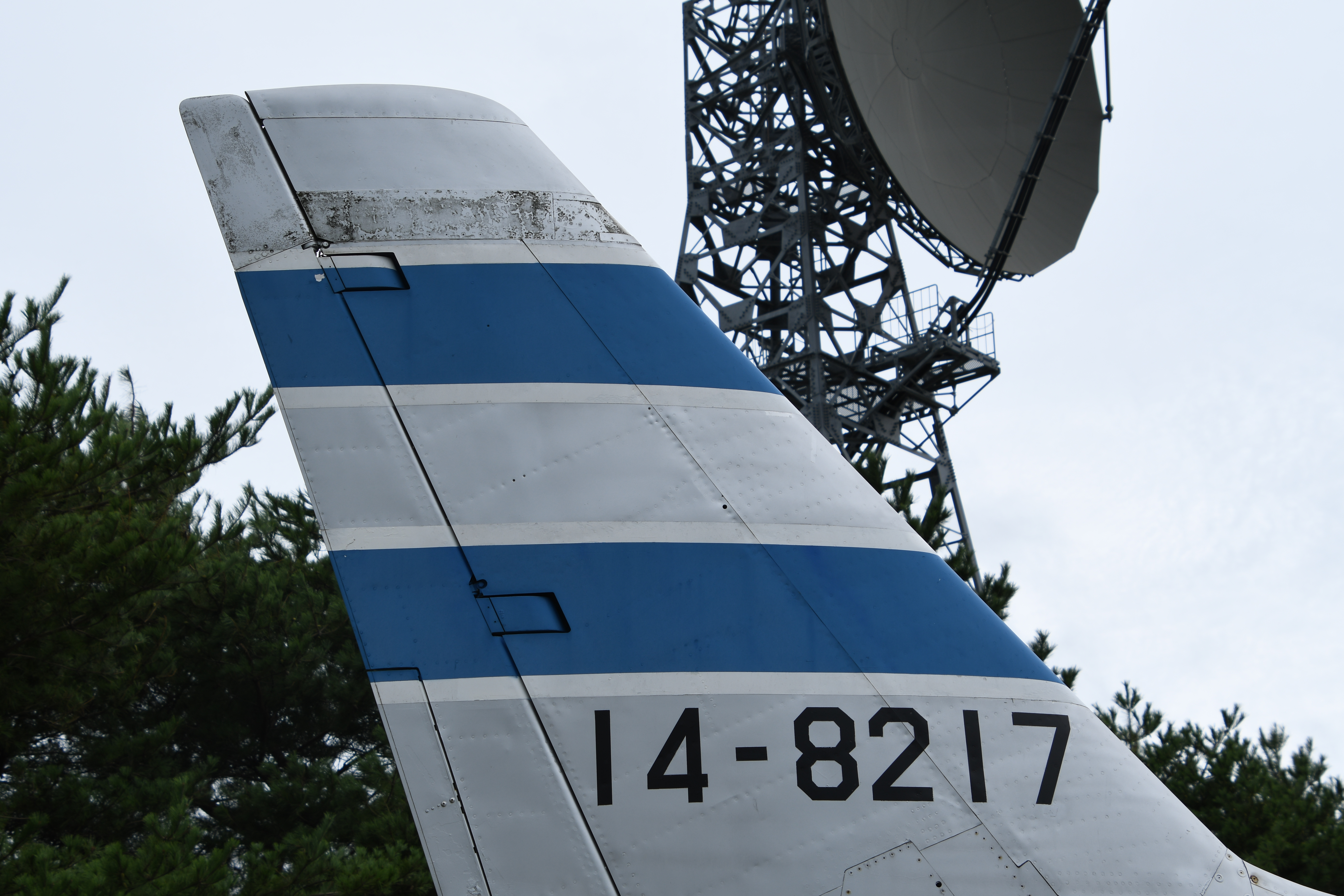 航空自衛隊 F-86D戦闘機（14-8217号機） 垂直尾翼 右側面。2018年9月17日 小松基地にて。